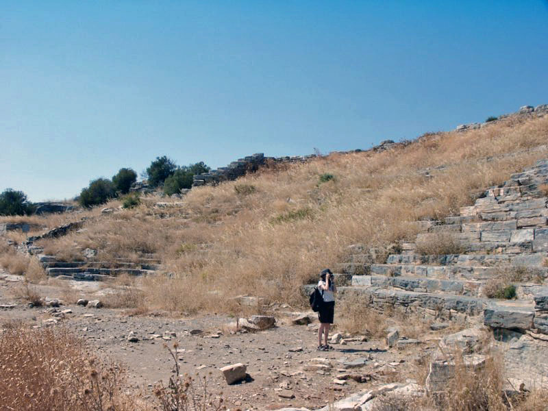 Das Theater von Thorikos